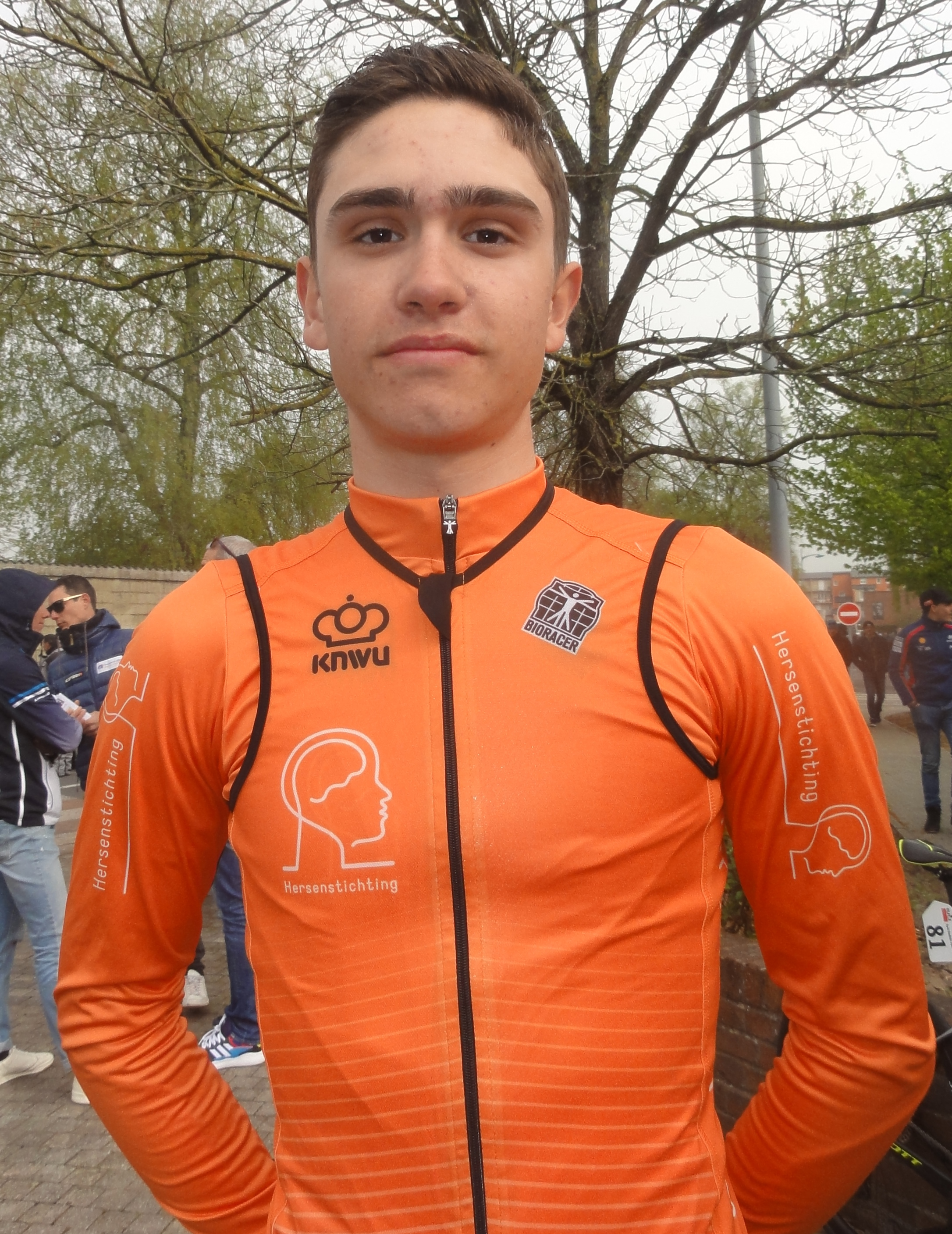 Reportage réalisé le dimanche 14 avril à l'occasion du départ du Paris-Roubaix juniors 2019 à Saint-Amand-les-Eaux, France.